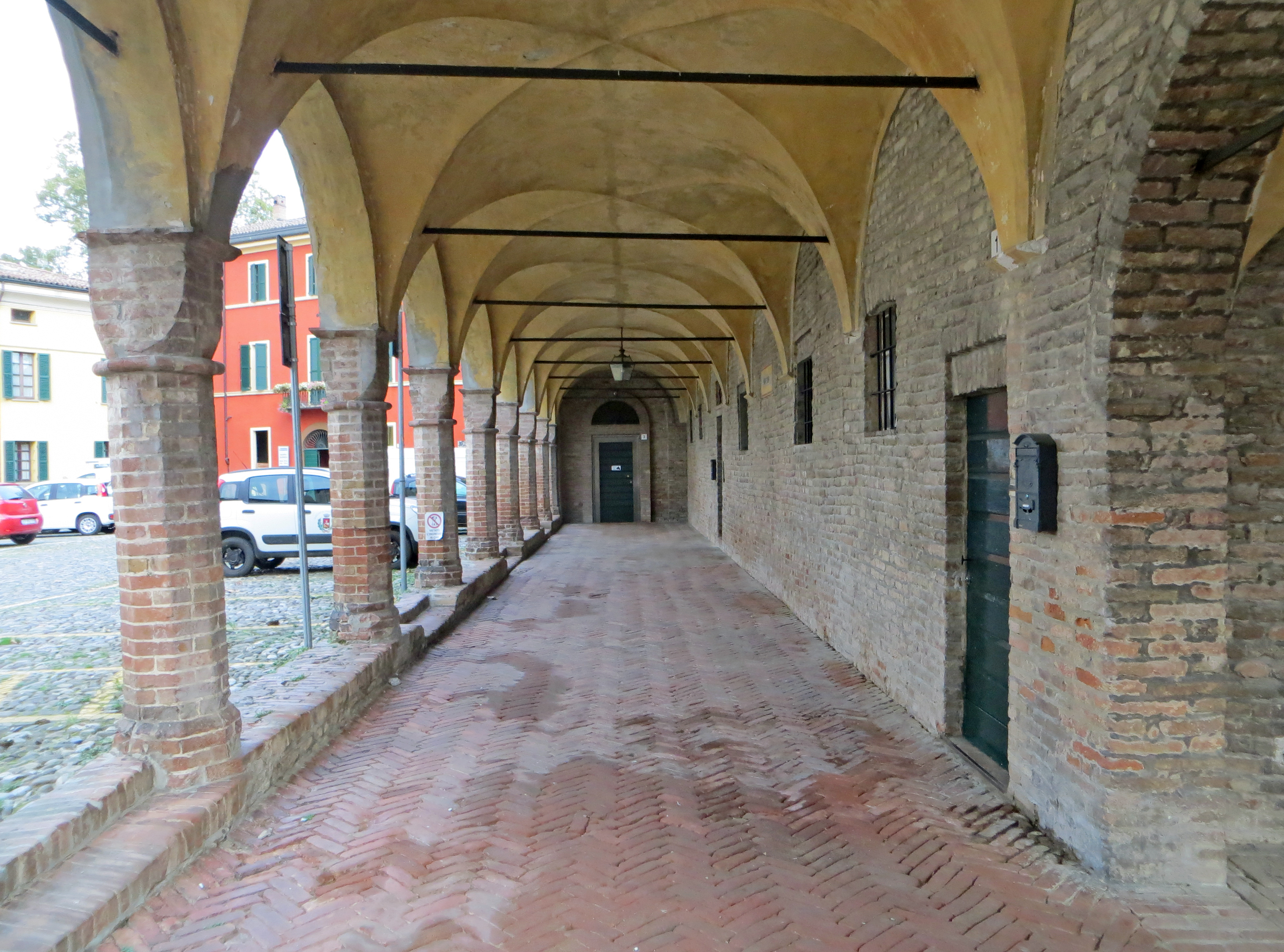 Scuderie Sanvitale (Fontanellato) - porticato